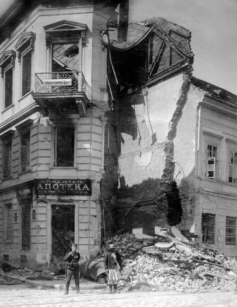 Француско књижевно друштво у Београду уништено аустро-угарским гранатама